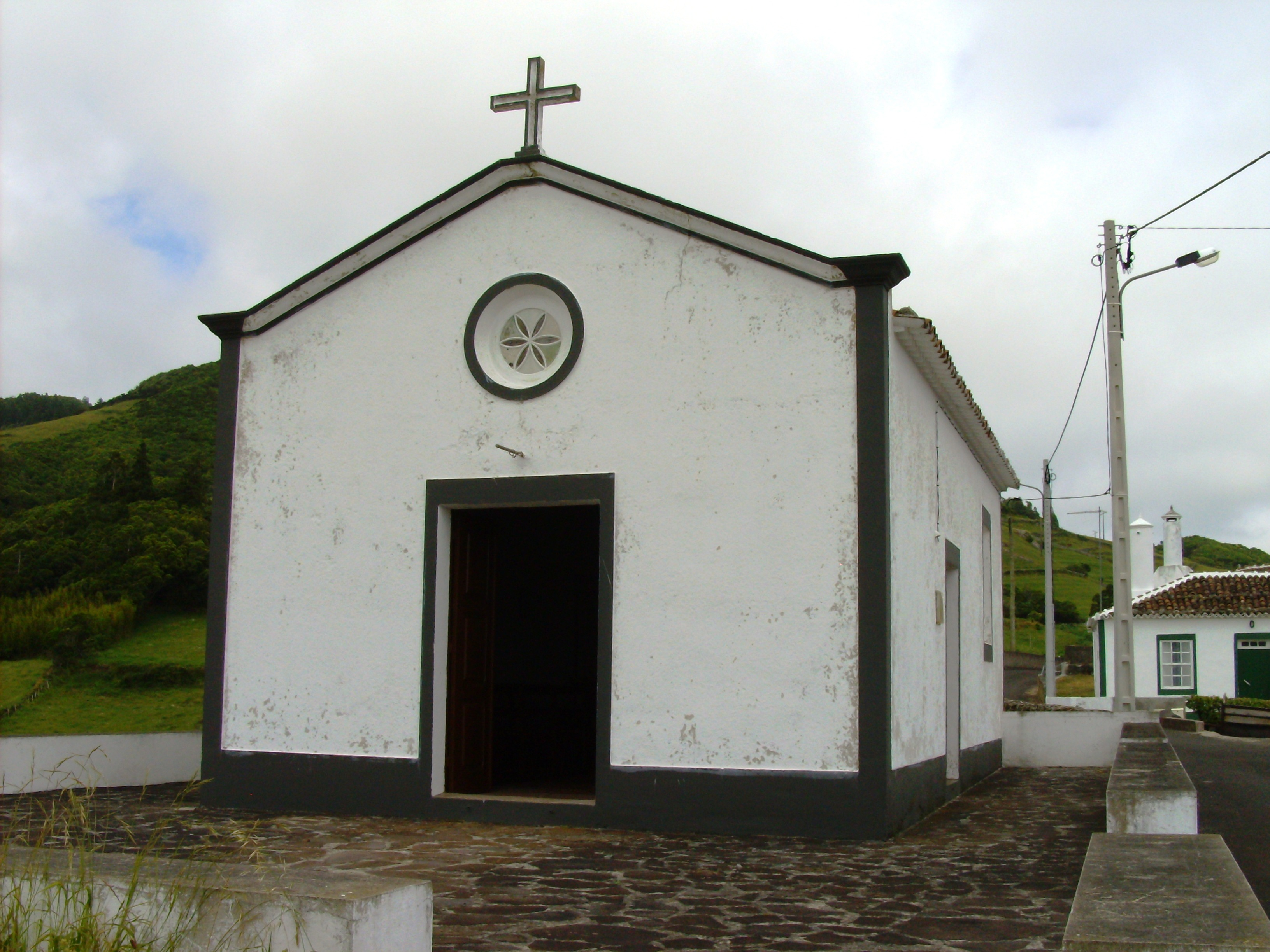 Ermida de Nossa Senhora da Piedade, Ilha de Santa Maria (Açores), Portugal.